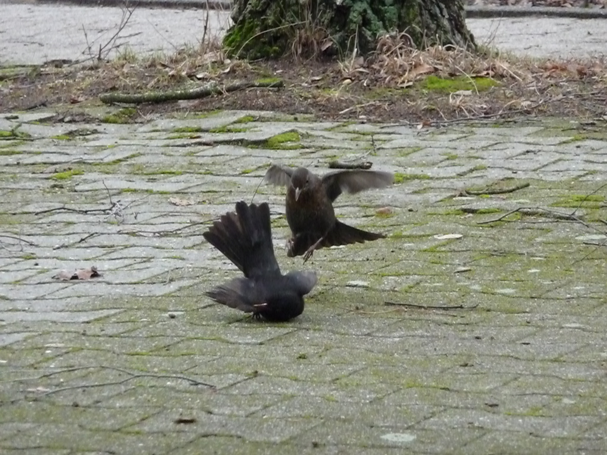 Amselweibchen greift ein Amselmännchen an